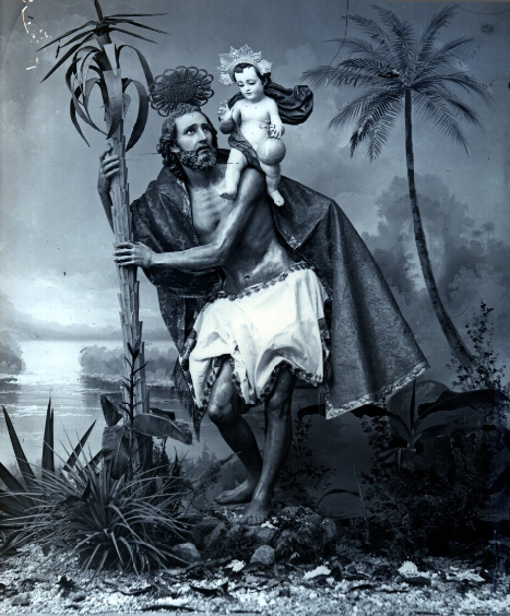 Talla de San Cristobal de la iglesia de San Cristobal Bajo en Antigua Guatemala. Fotografía de hacia 1910 del fotógrafo Juan José de Jesús Yas.